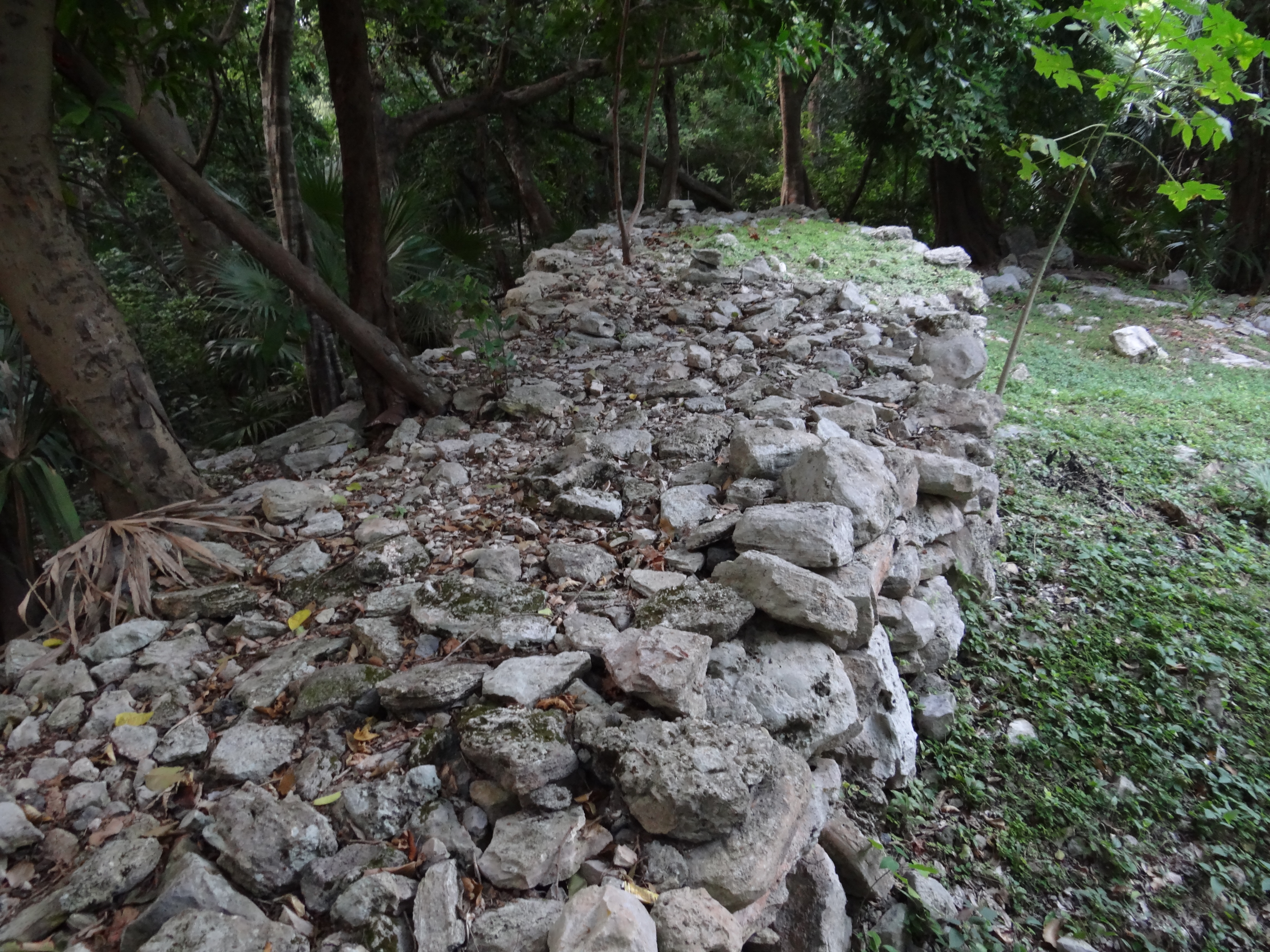 Xaman-Ha, or "waters of the north," is archaeology site in Playa del Carmen.It was a rest stop of sorts for Mayan travelers making their way from the great cities of the Mayan world to the island of Cozumel. שאמאן-הַא הם שמם של של שרידים ארכאולוגים הנמצאים על חוף הים הקריבי בחצי האי יוקטן. משמעות השם בשפת המאיה הוא מים של הצפון. במקום שוכנת היום העיר פְּלַאיה דֶל כַּרְמֶן.